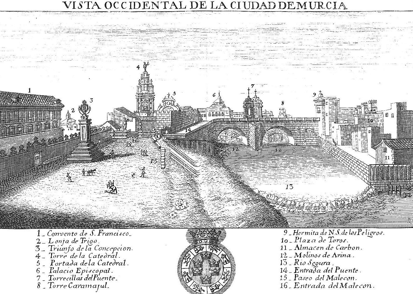 Estampa 3. Vista occidental de la Ciudad de Murcia